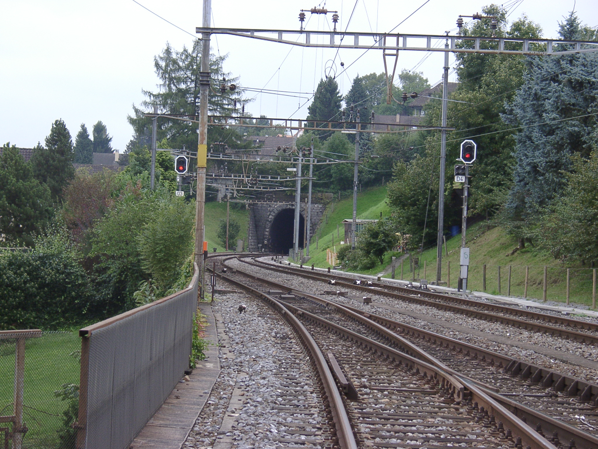 Tunnelportal des Zimmerbergtunnels Seite Horgen Oberdorf